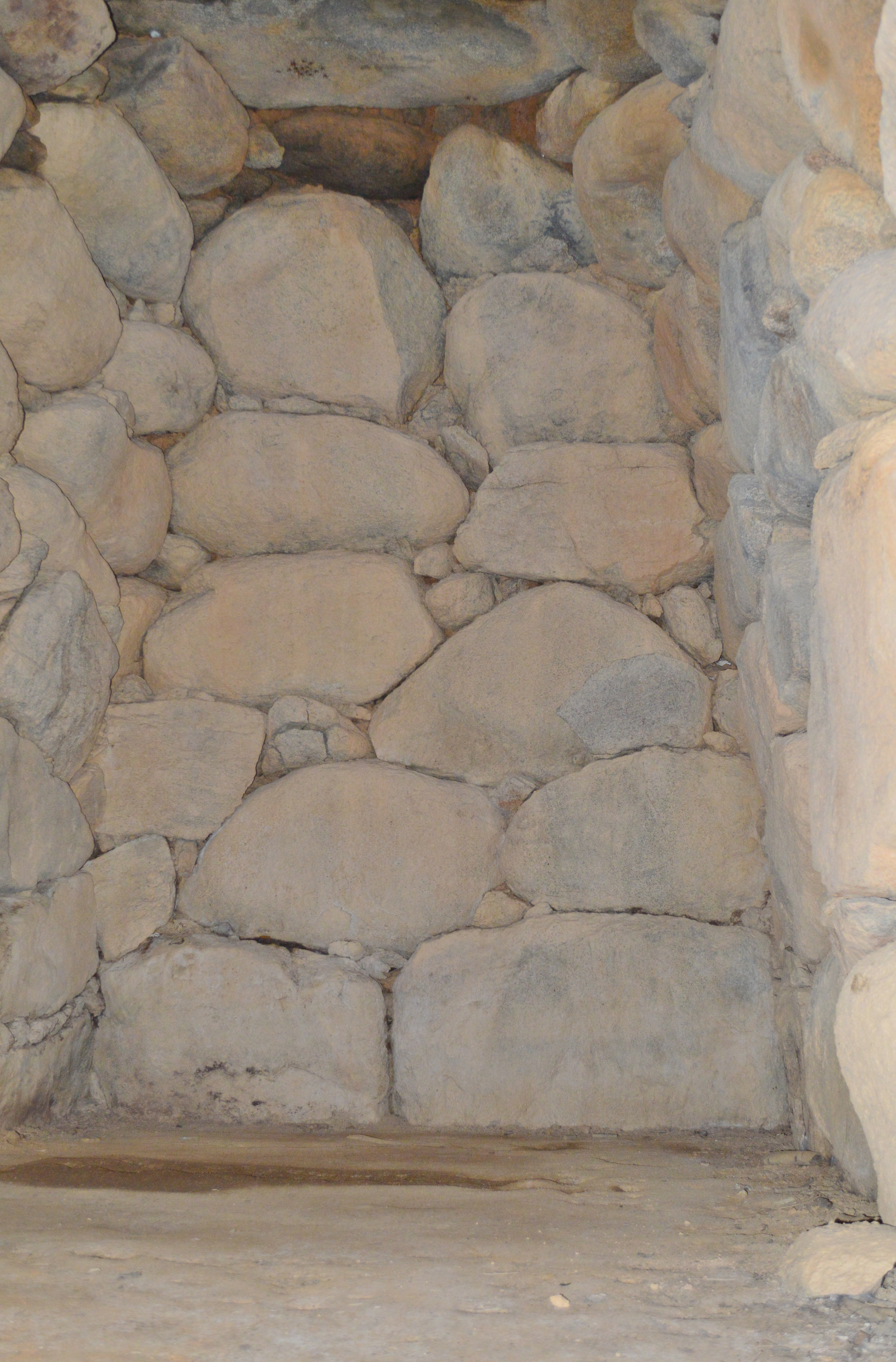 沼山古墳 石室玄室